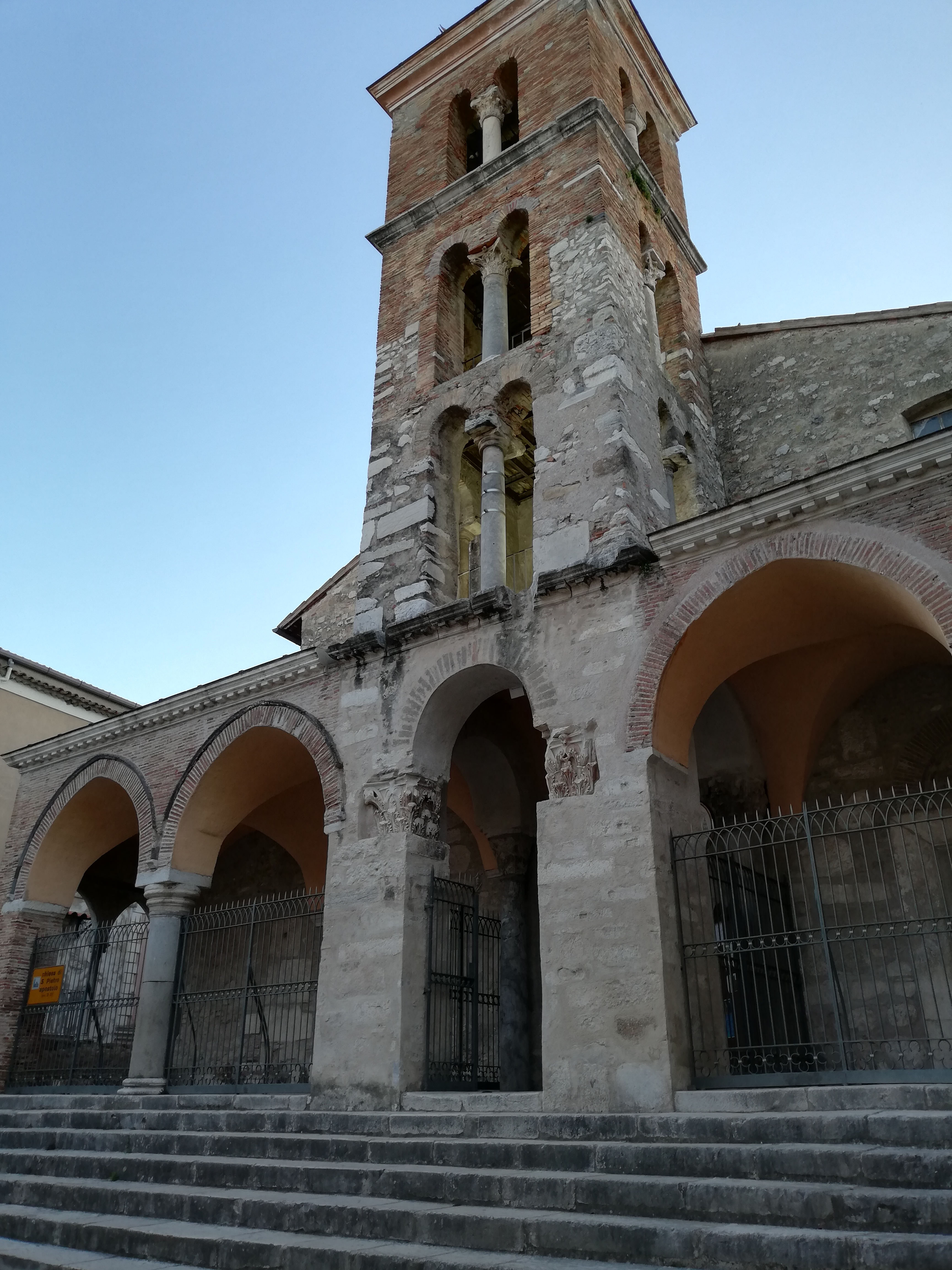 San Pietro (Minturno) - Exterior